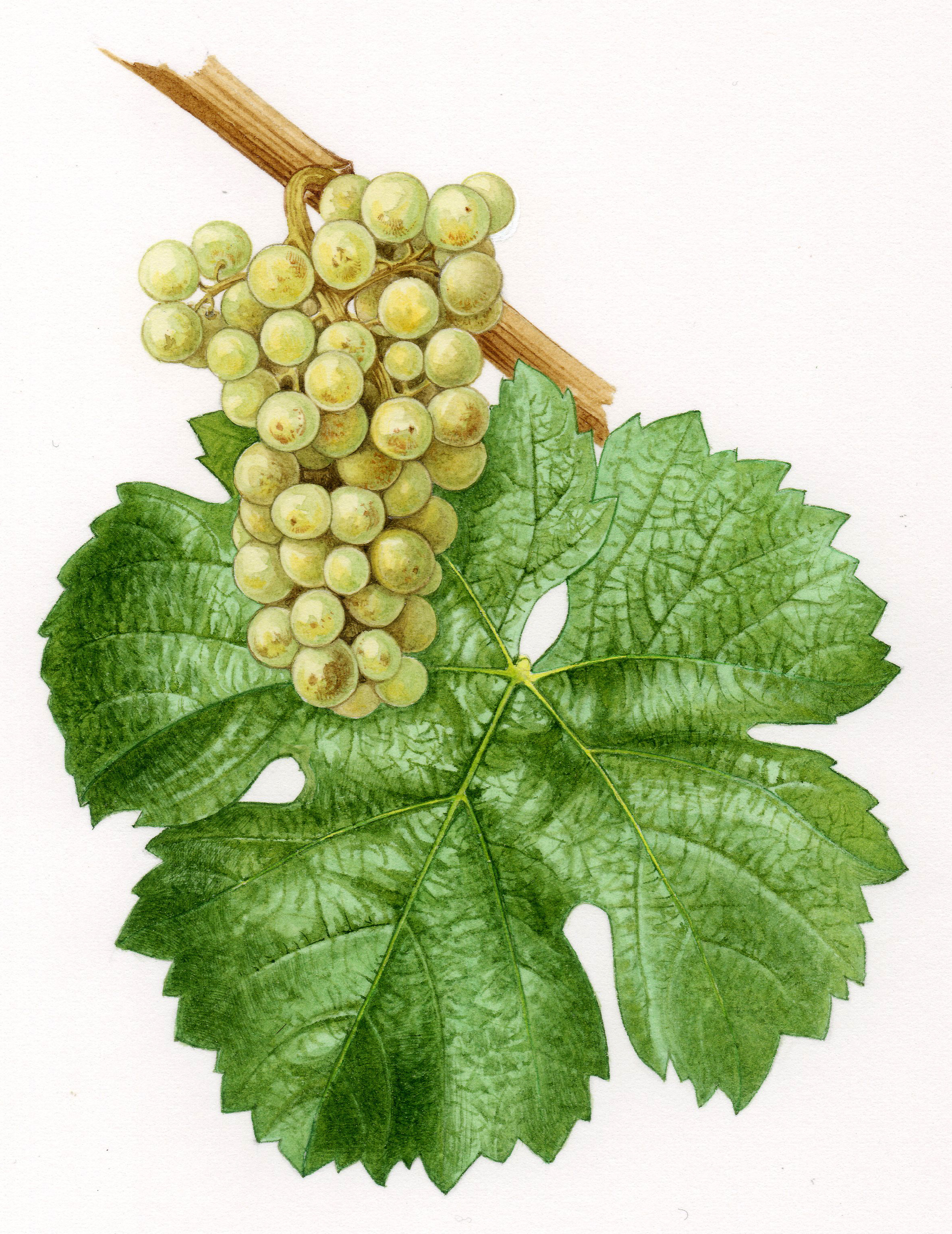 Aquarelle originale pour les Cépages de France (2001)